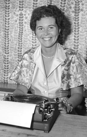 portrett, kvinne, forfatter, sittende halvfigur ved skrivebord, skrivemaskin. Rigmor Dahl Delphin (1908-1993) var ansatt som fotograf i ukebladet Alle Kvinner. Hennes negativarkiv ble i 2005 overført Oslo Bymuseum fra Gyldendal Norsk Forlag som var utgiver av bladet.